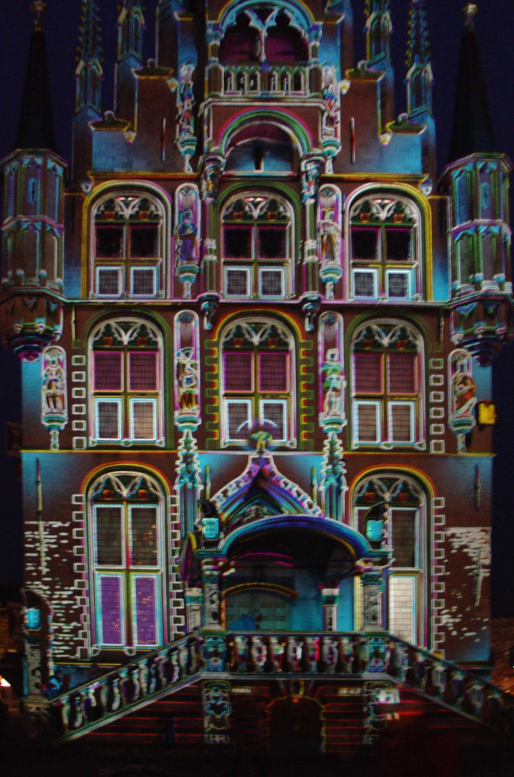 Stadhuis Gouda lichtshow december 2005